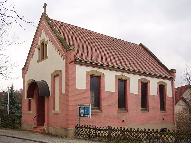 Evangelisch-methodistische Kapelle in Heilbronn-Sontheim, erbaut 1907